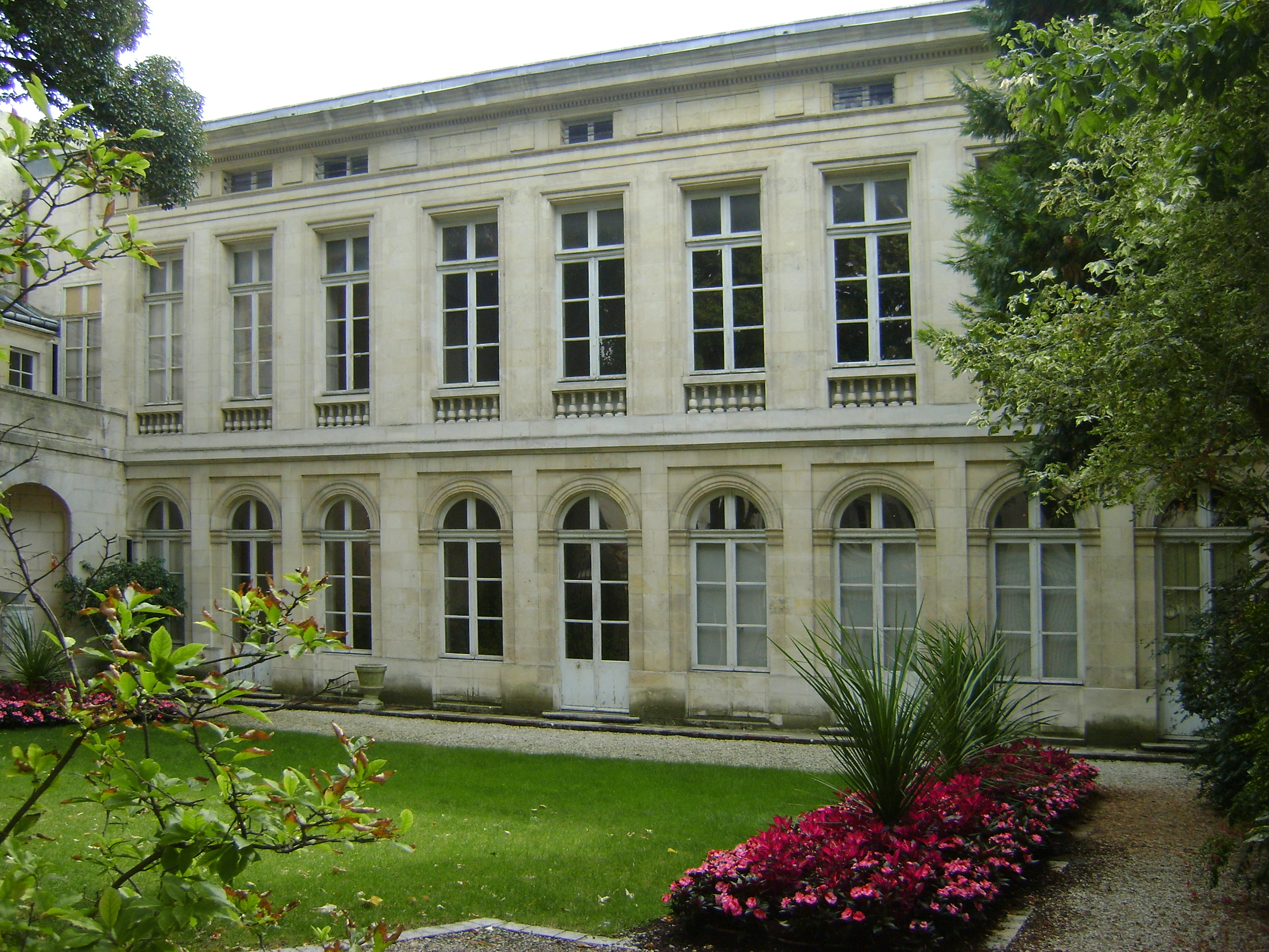 Hôtel Fleuriau de la Rochelle au 10 rue Fleuriau. XVIIIème siècle. Façade sur jardin coté rue Gargoulleau. Devenu aujourd'hui le Musée du Nouveau Monde.